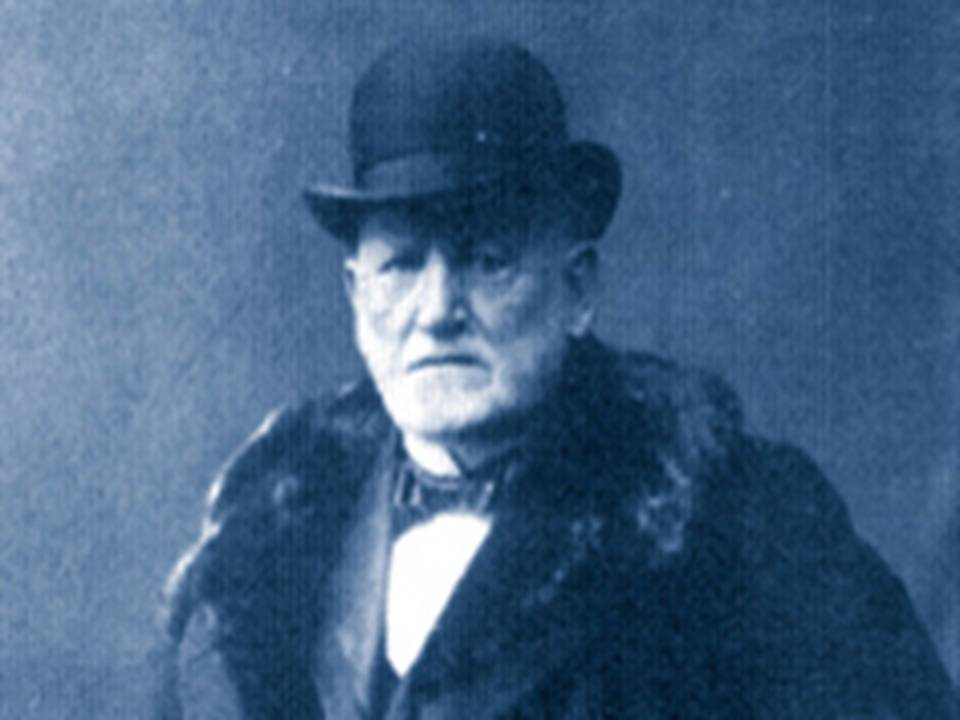 Portrait Carl Röchling (Industrieller) (1827 - 1910)